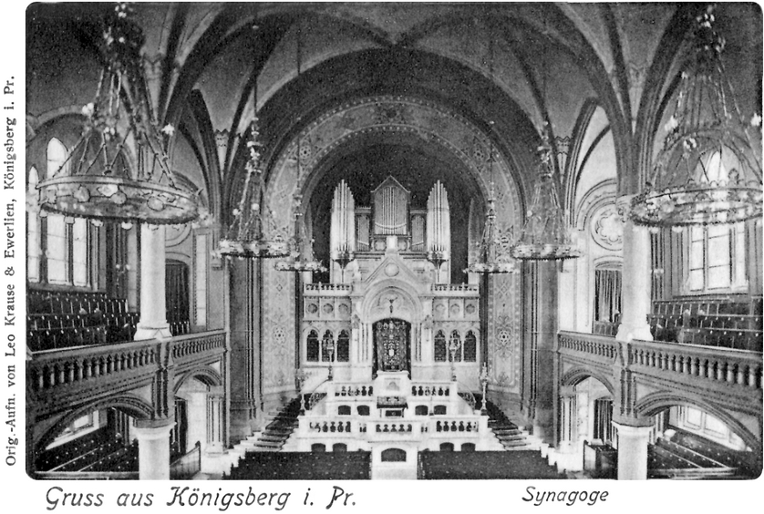 Die Königsberger Neue Synagoge